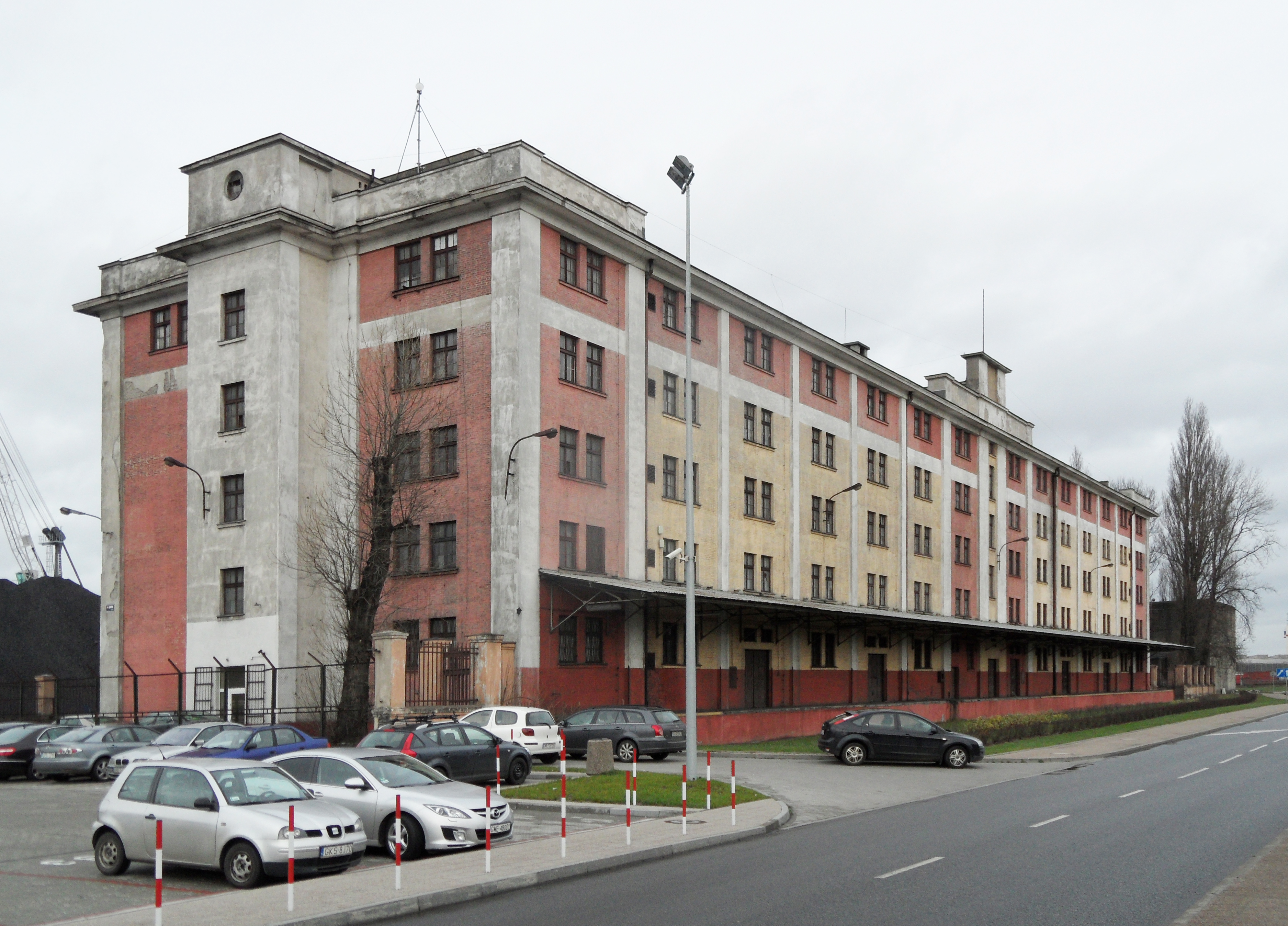 Gdynia, ul. Polska 7 - dawny magazyn Polskiego Monopolu Tytoniowego "Polski Tytoń", bud. 1930-31